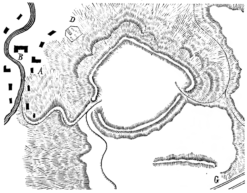 Půdorys hradiště podle Jana Erazima Vocela z let 1866–1888